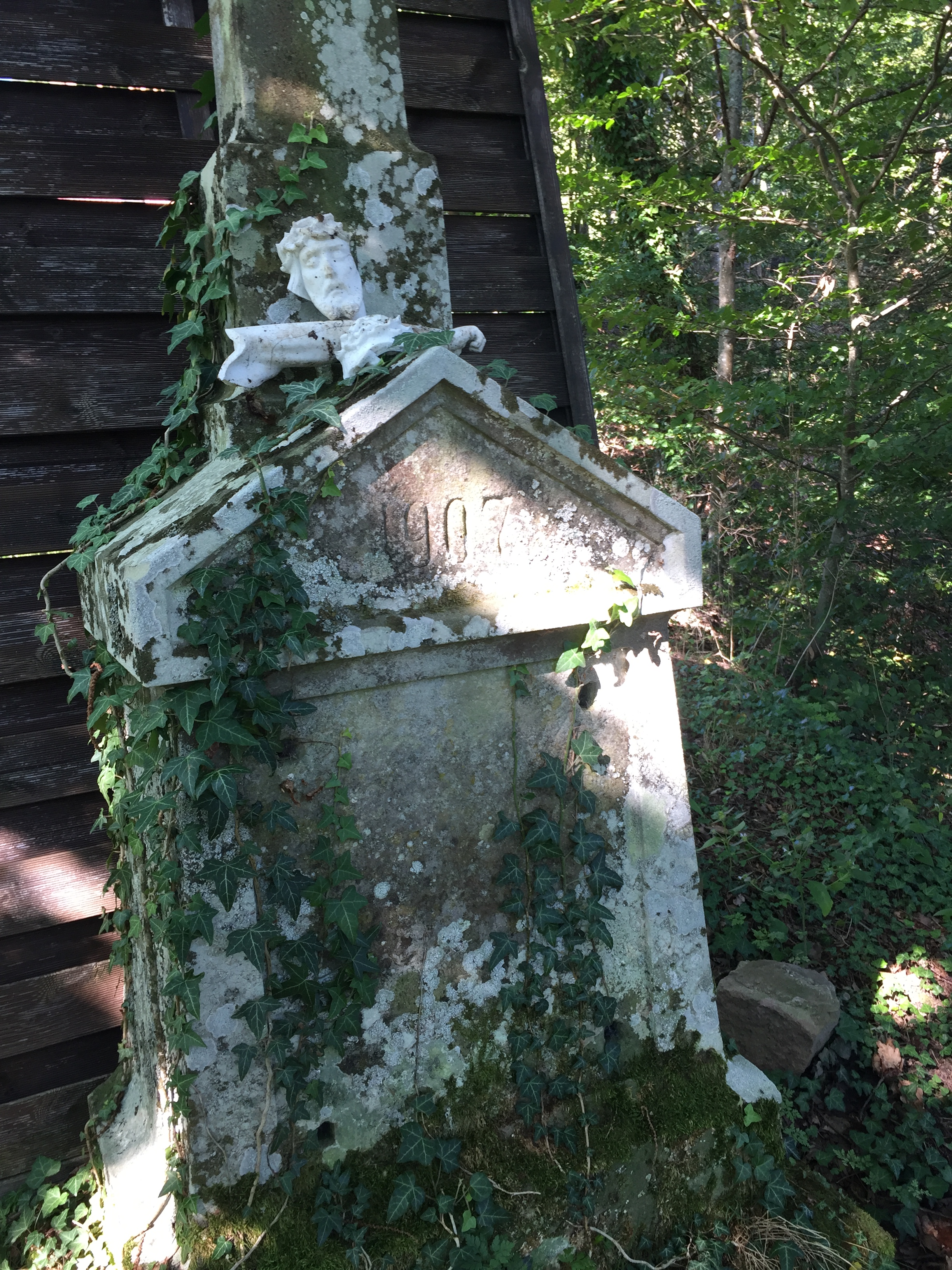 Croix BATY en l'état (2017)